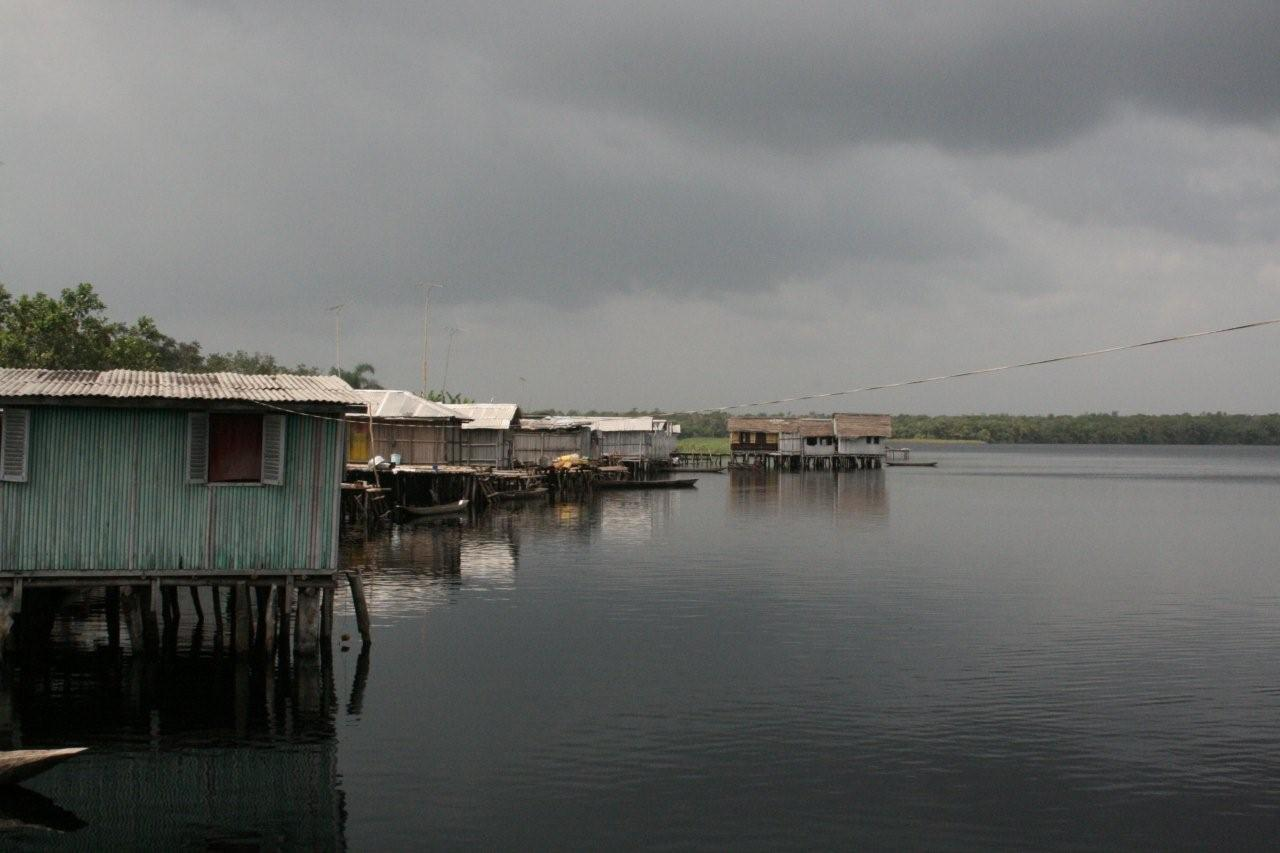 Villaggio di Nzulezo - Ghana Dicembre 2006 - Chiappi Nicola